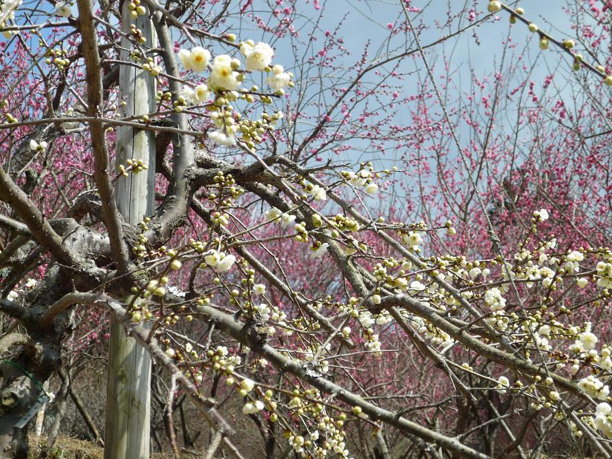 湯河原梅林（幕山公園）梅の宴 まだ咲き始めでしたが、コントラストの美しい梅の瞬間です